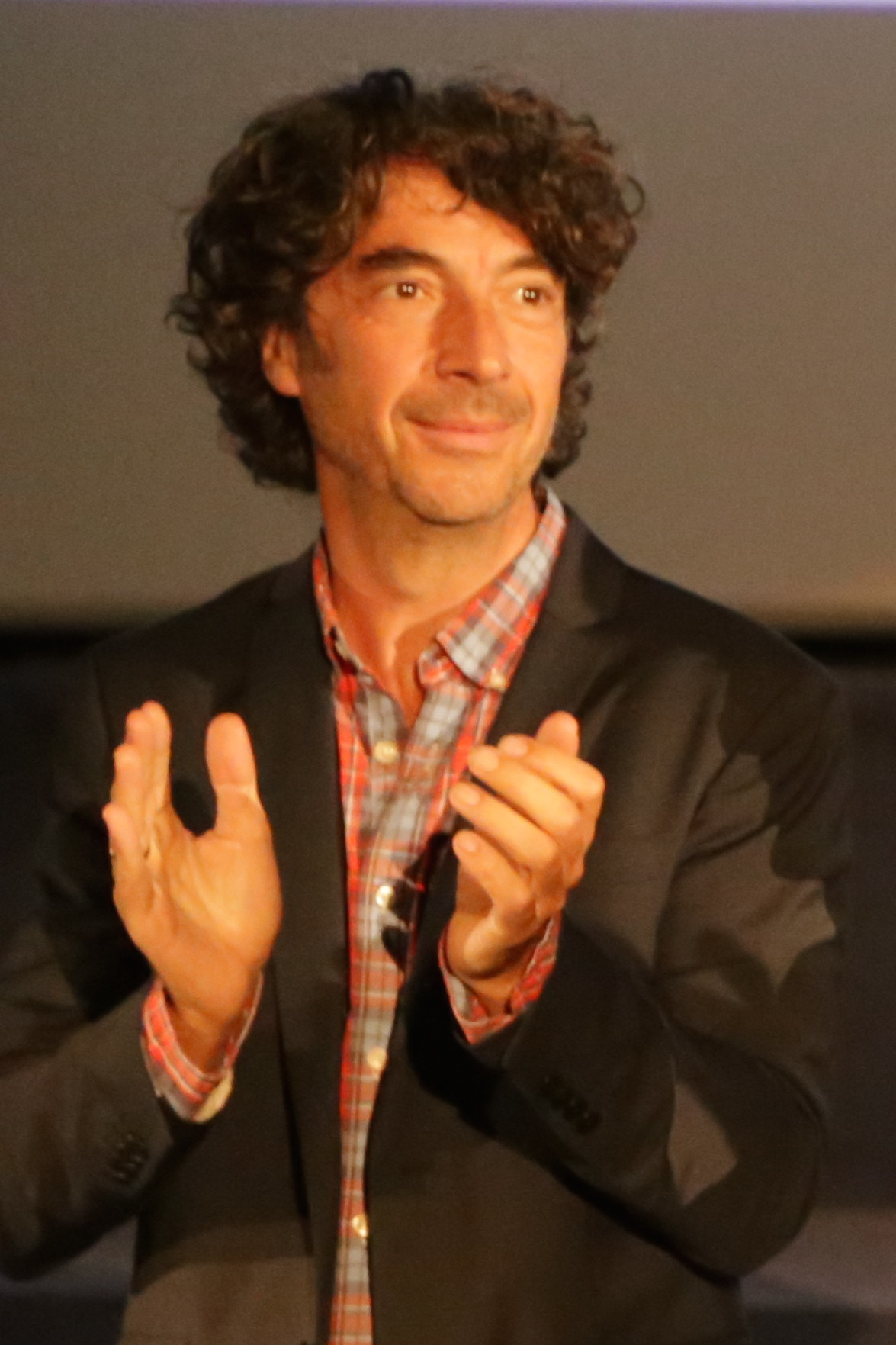 Avant première du film Barbecue